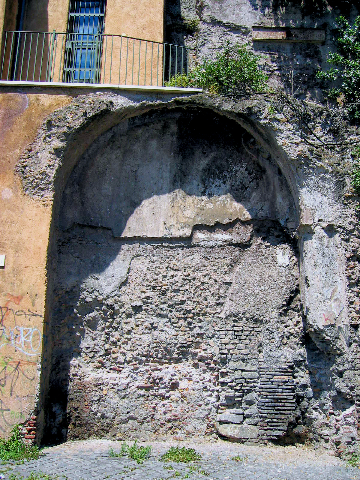 Abside della chiesa scomparsa di Santa Maria dei Cerchi